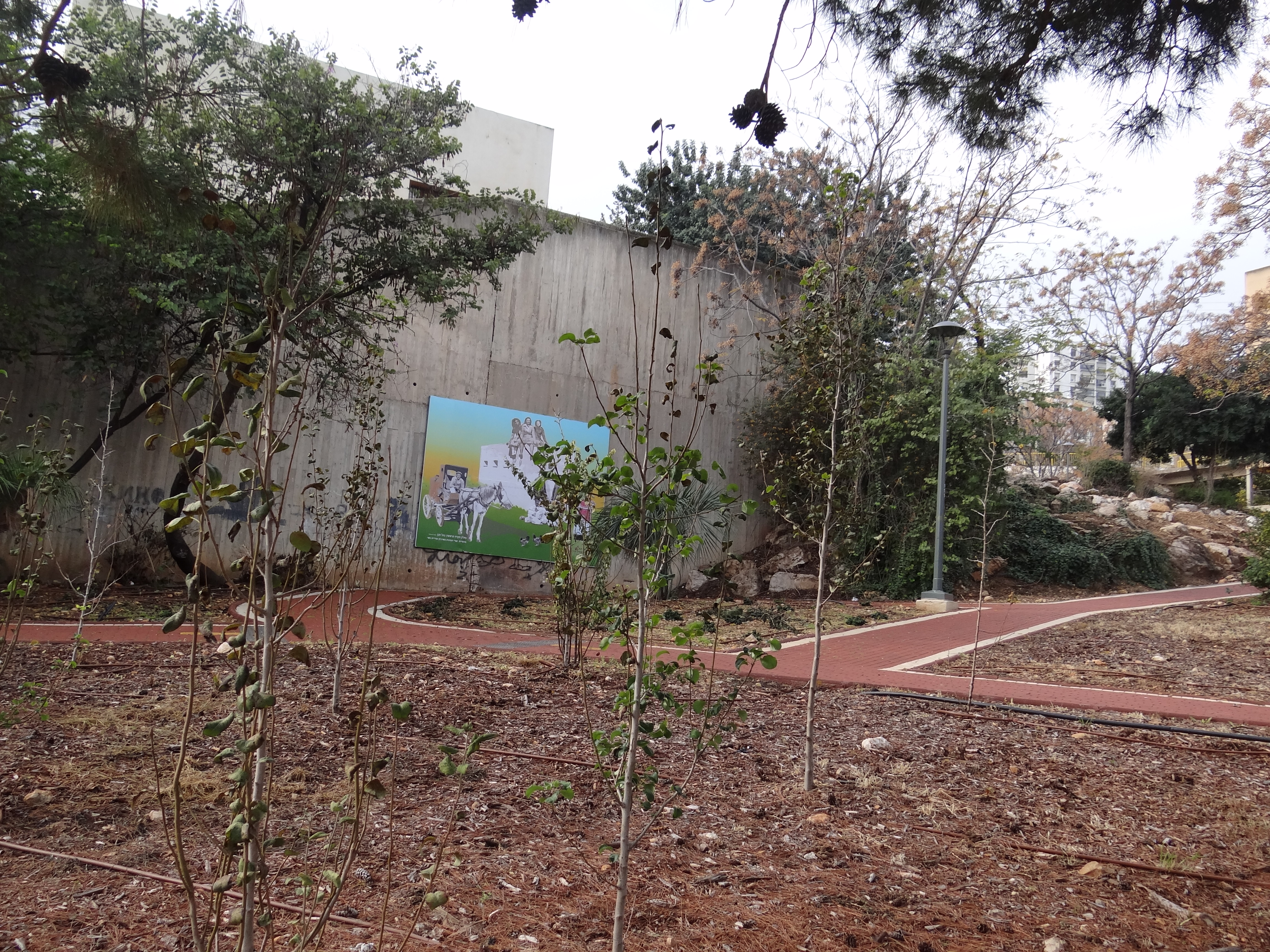 פארק שמואל על שם שמואל רייניש שהיה ראש המועצה של העיר נשר בין השנים 1989-1978 נמצא בואדי שמפריד בין שכונת בן-דור לבין שכונת גבעת עמוס בעיר נשר. שכונת גבעת עמוס הוקמה בסוף שנות ה-70 של המאה העשרים. הפארק שוקם בשנת 2013